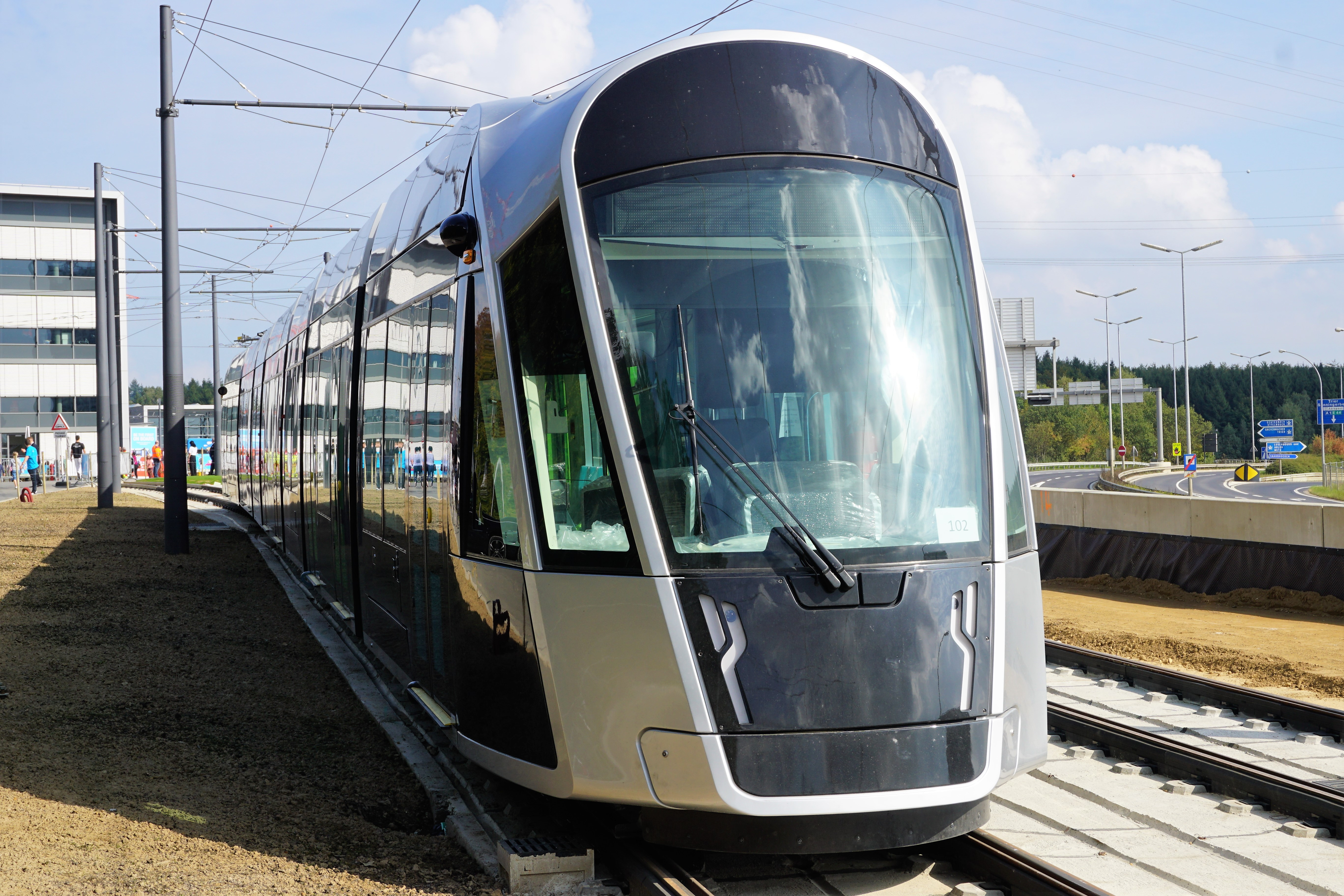 Luxembourg: présentation du tram lors des Journées portes ouvertes les 23/24 septembre 2017. Rame 102.